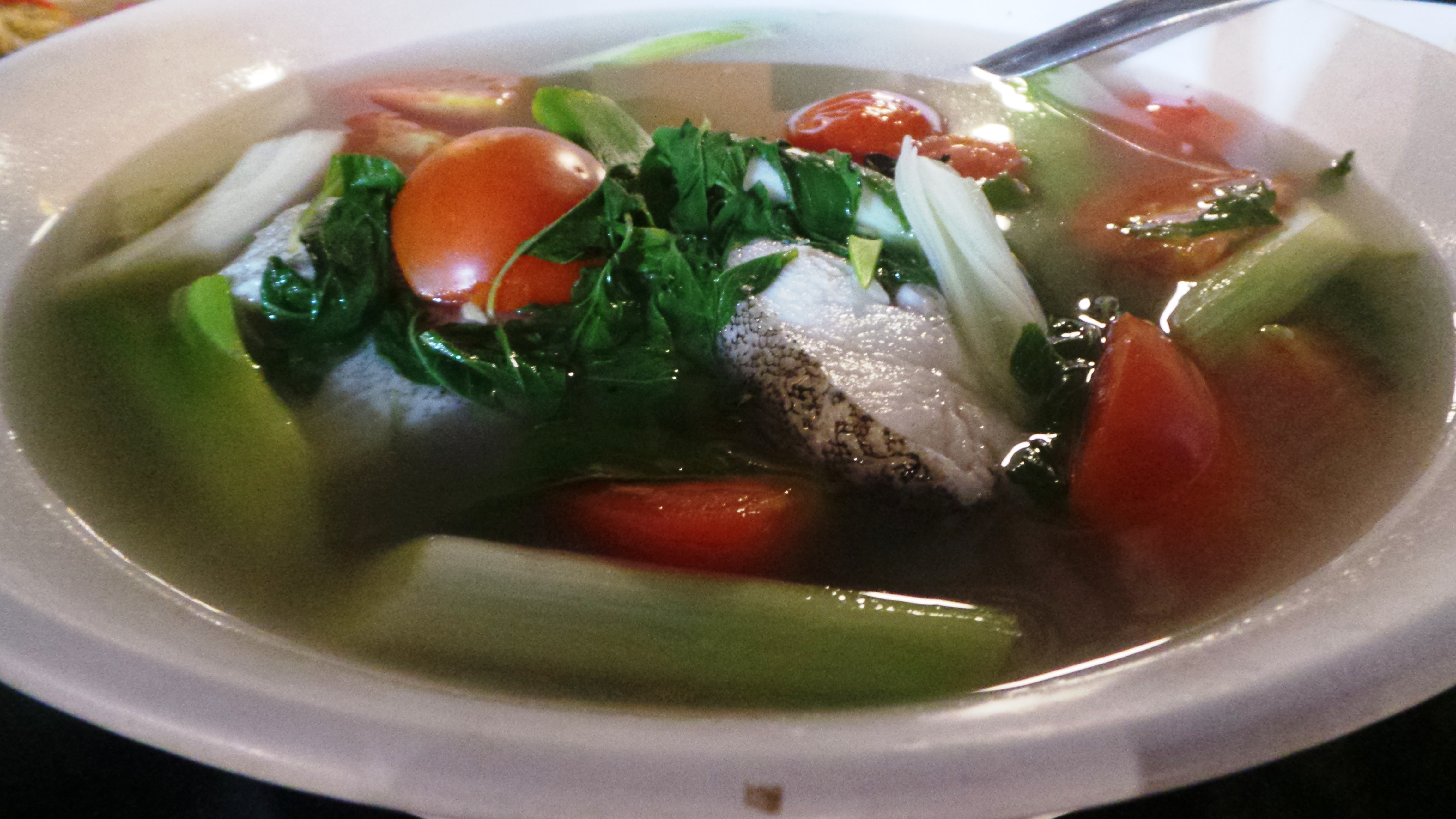 Makanan pembuka berupa sayur bening Khas Manado berisi ikan berkuah tomat, daun bawang, seledri, dan cabai rawit hijau